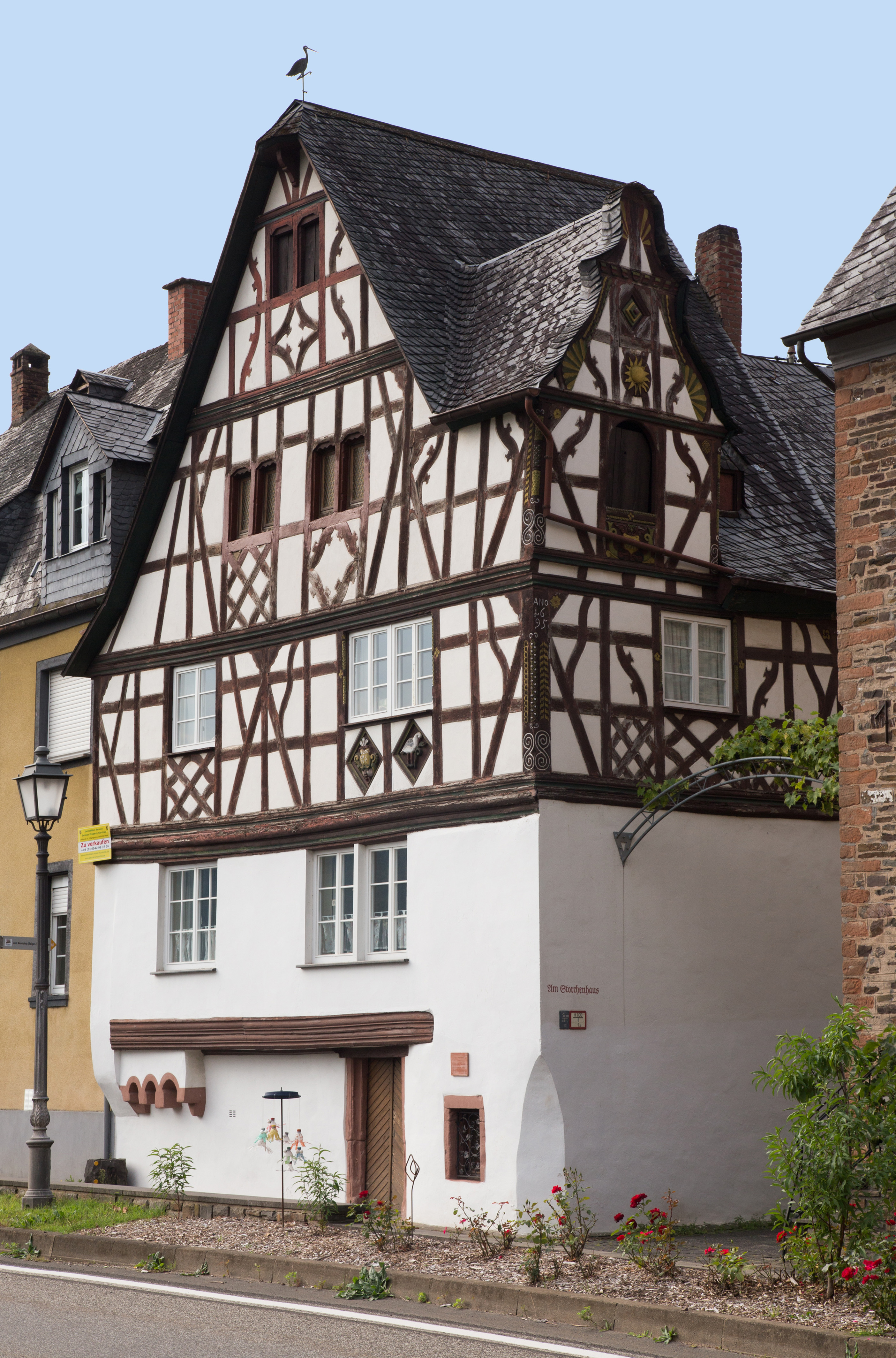 Dreigeschossiges reiches Fachwerkhaus, teilweise massiv, bezeichnet 1695